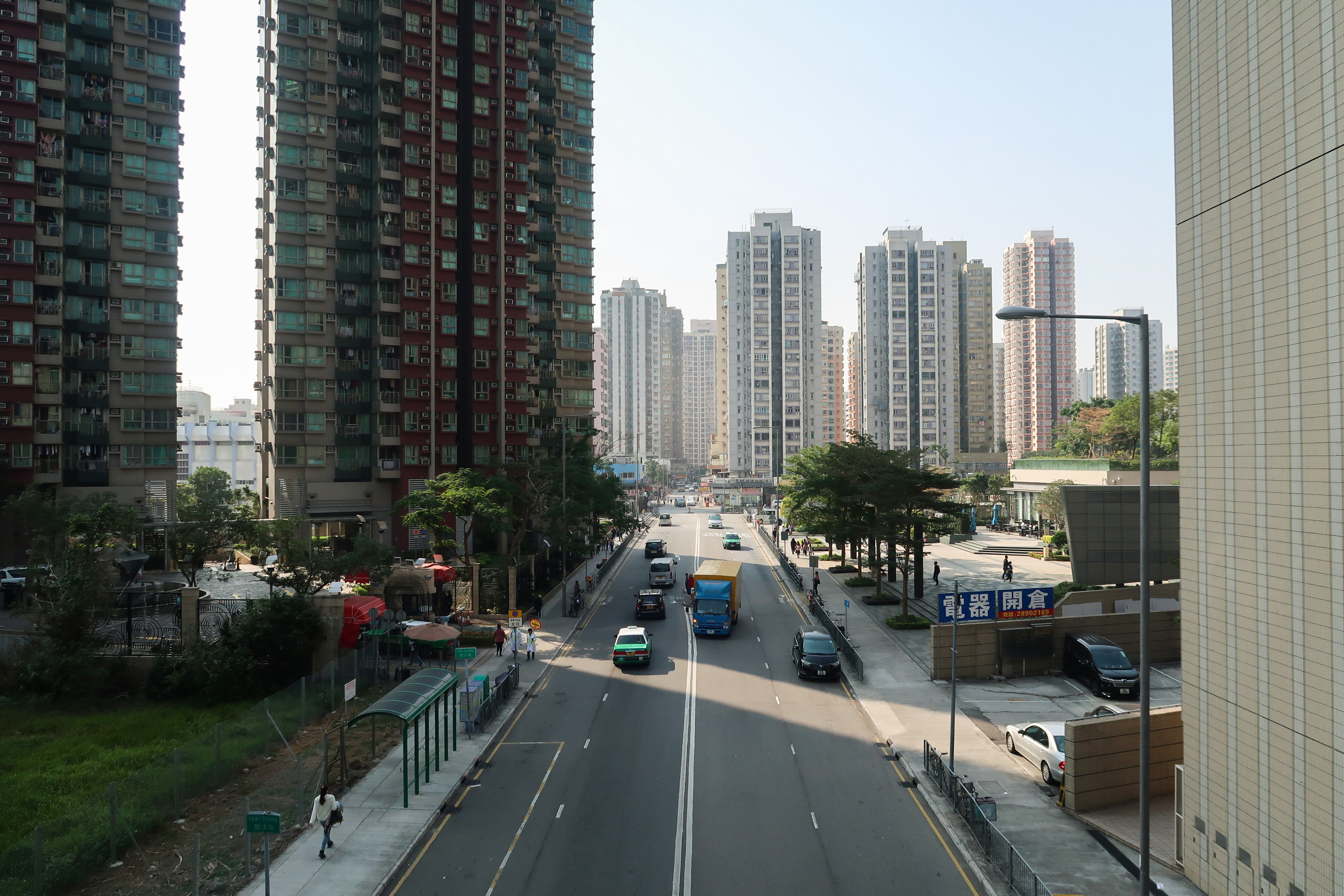 Yuen Lung Street